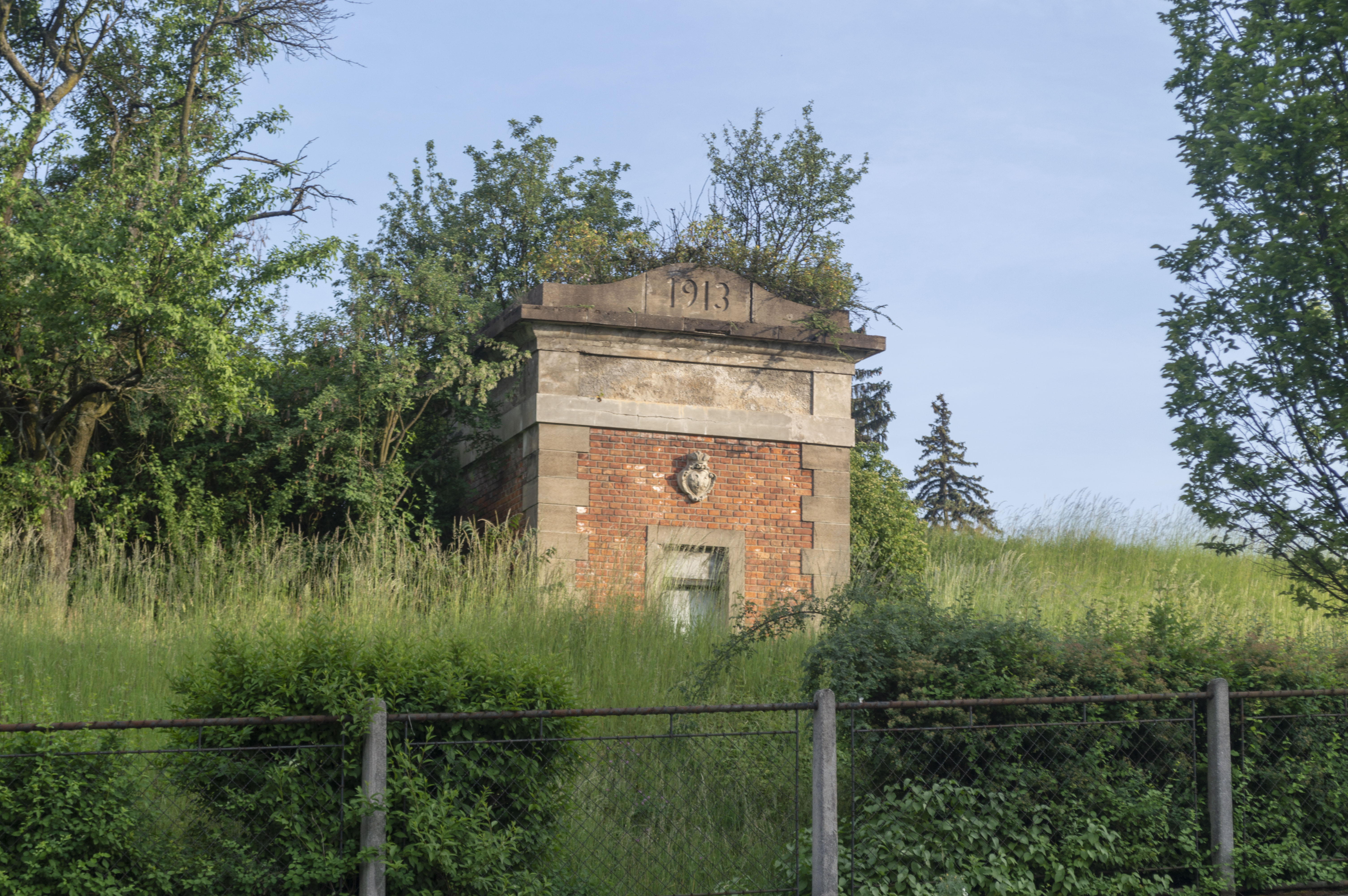 Nadzemní budova vodojemu na Žlutém kopci v Brně s letopočtem 1913.